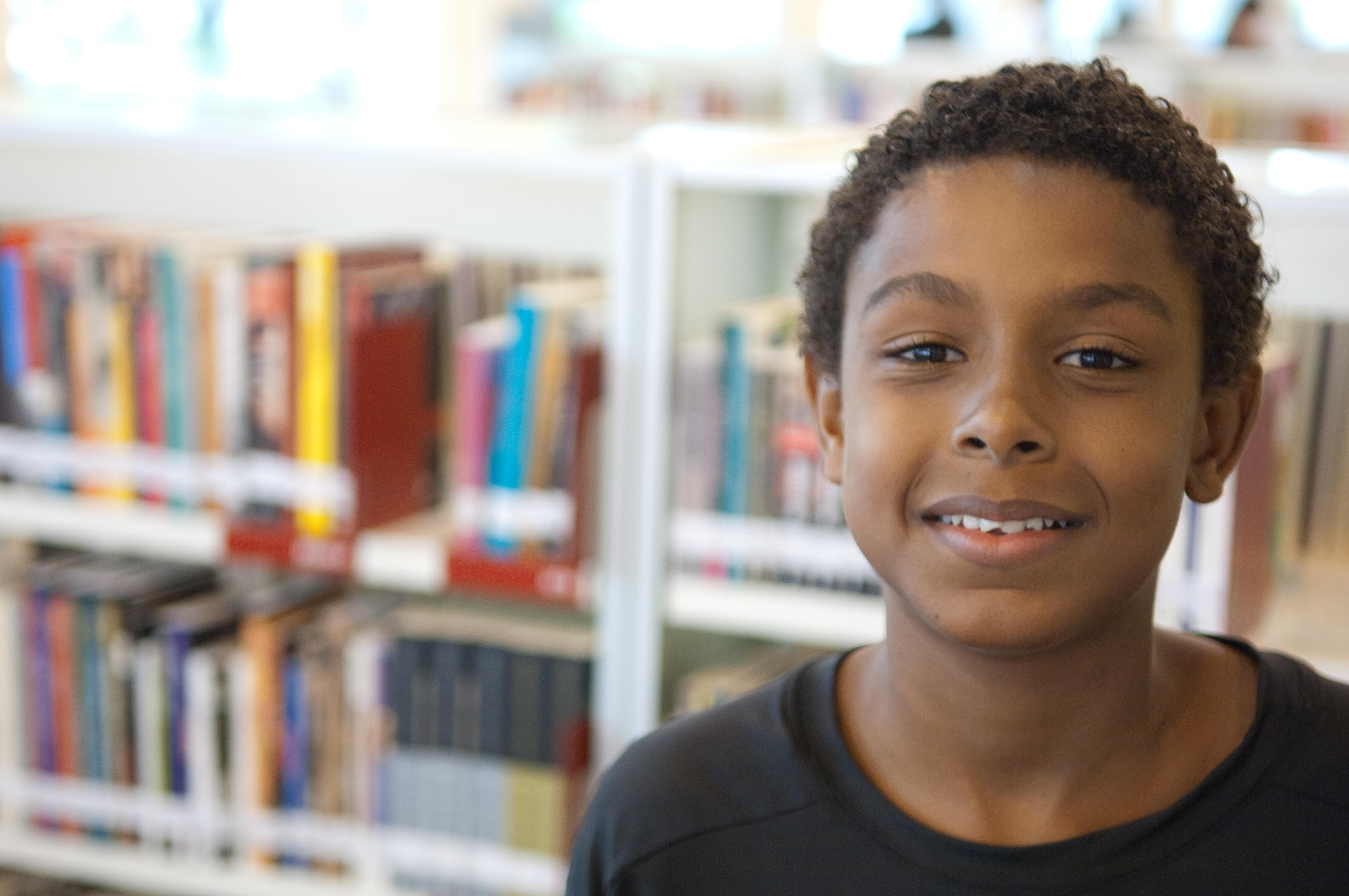 29/04/2010. Crédito: Pedro França/Minc. Brasil. Brasília-DF. Inauguração da Biblioteca Parque de Manguinhos - RJ